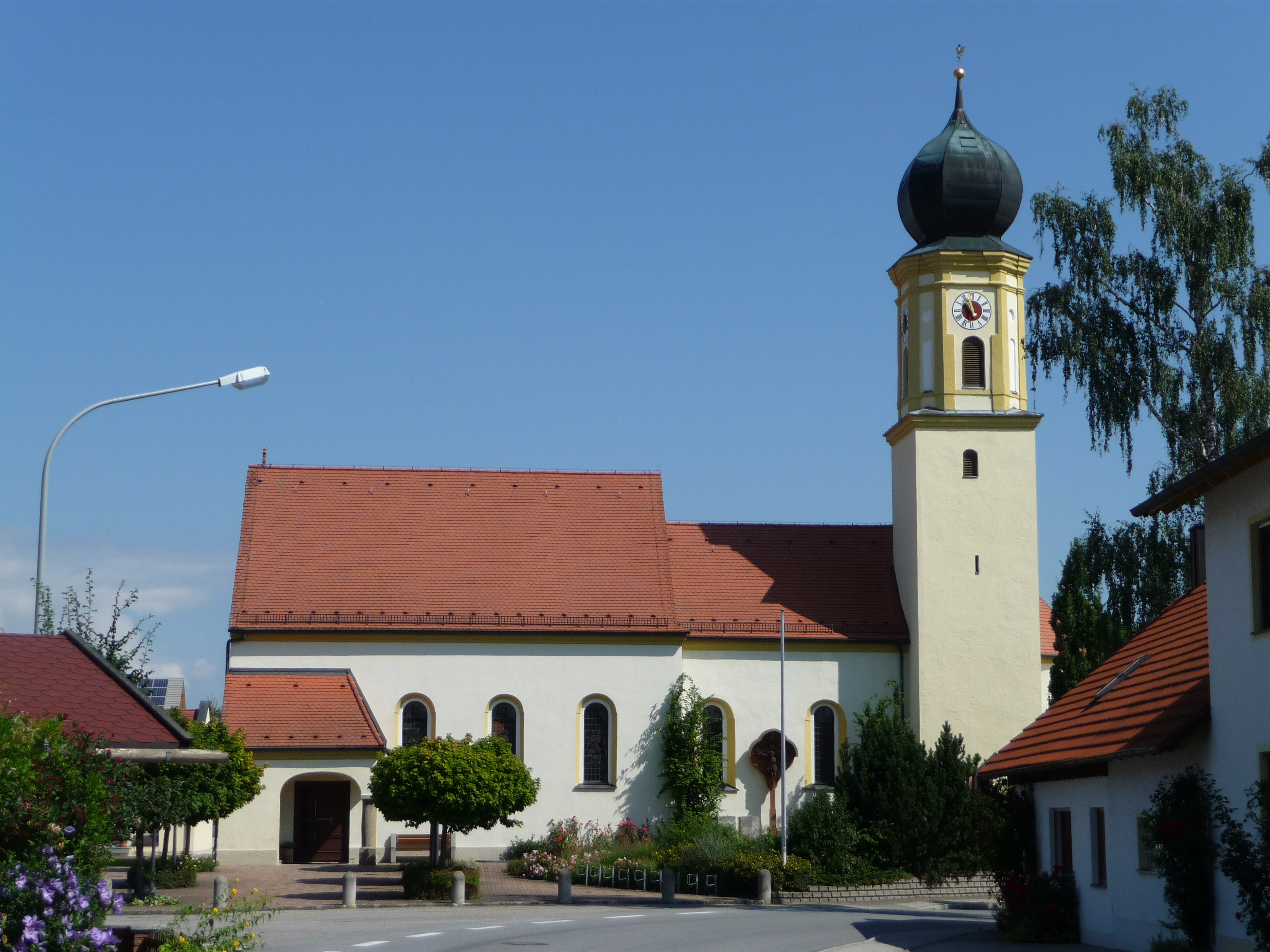 Die Nebenkirche St. Peter und Paul in Salching